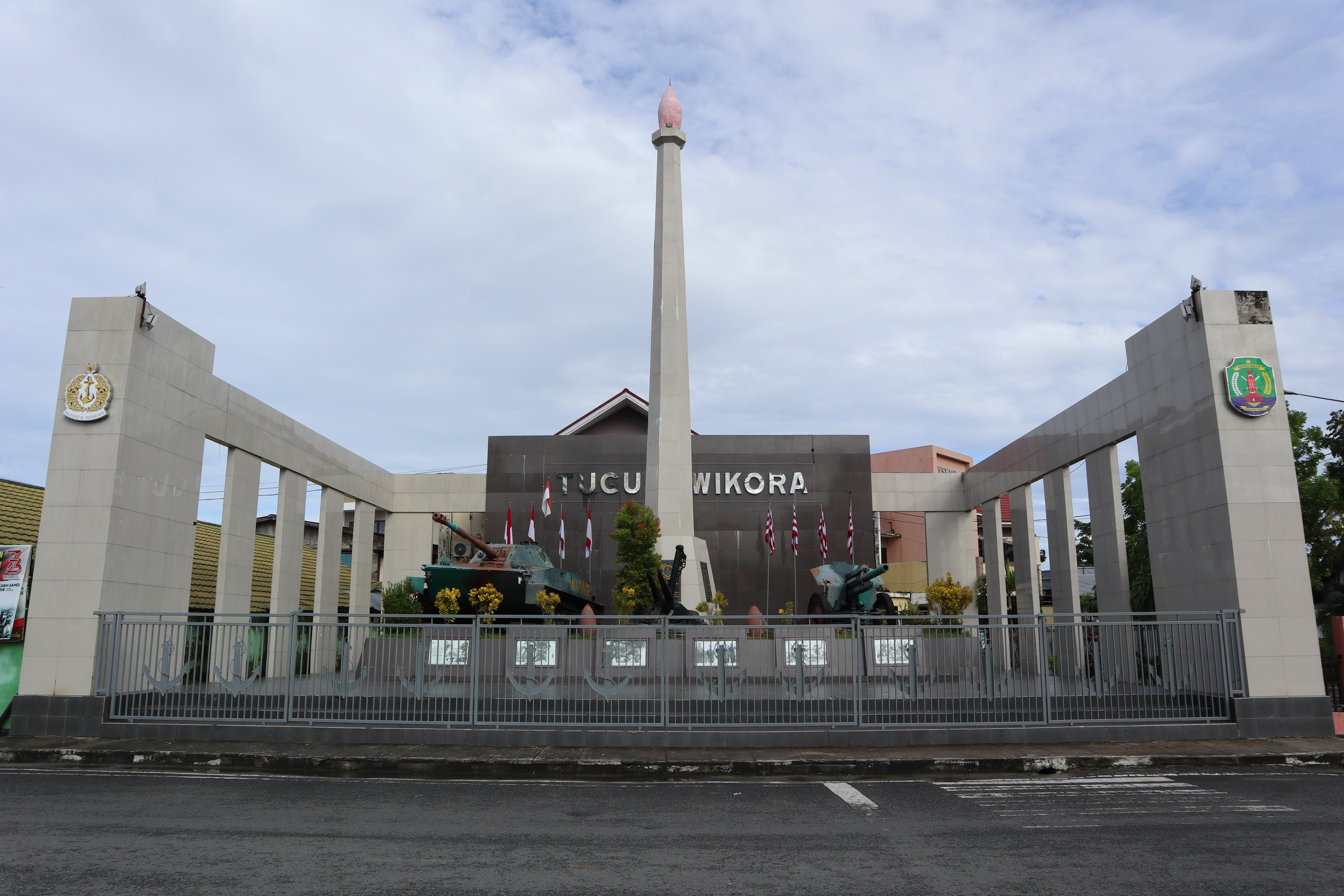 Tugu Dwikora di dekat Alun-Alun Kota Nunukan.